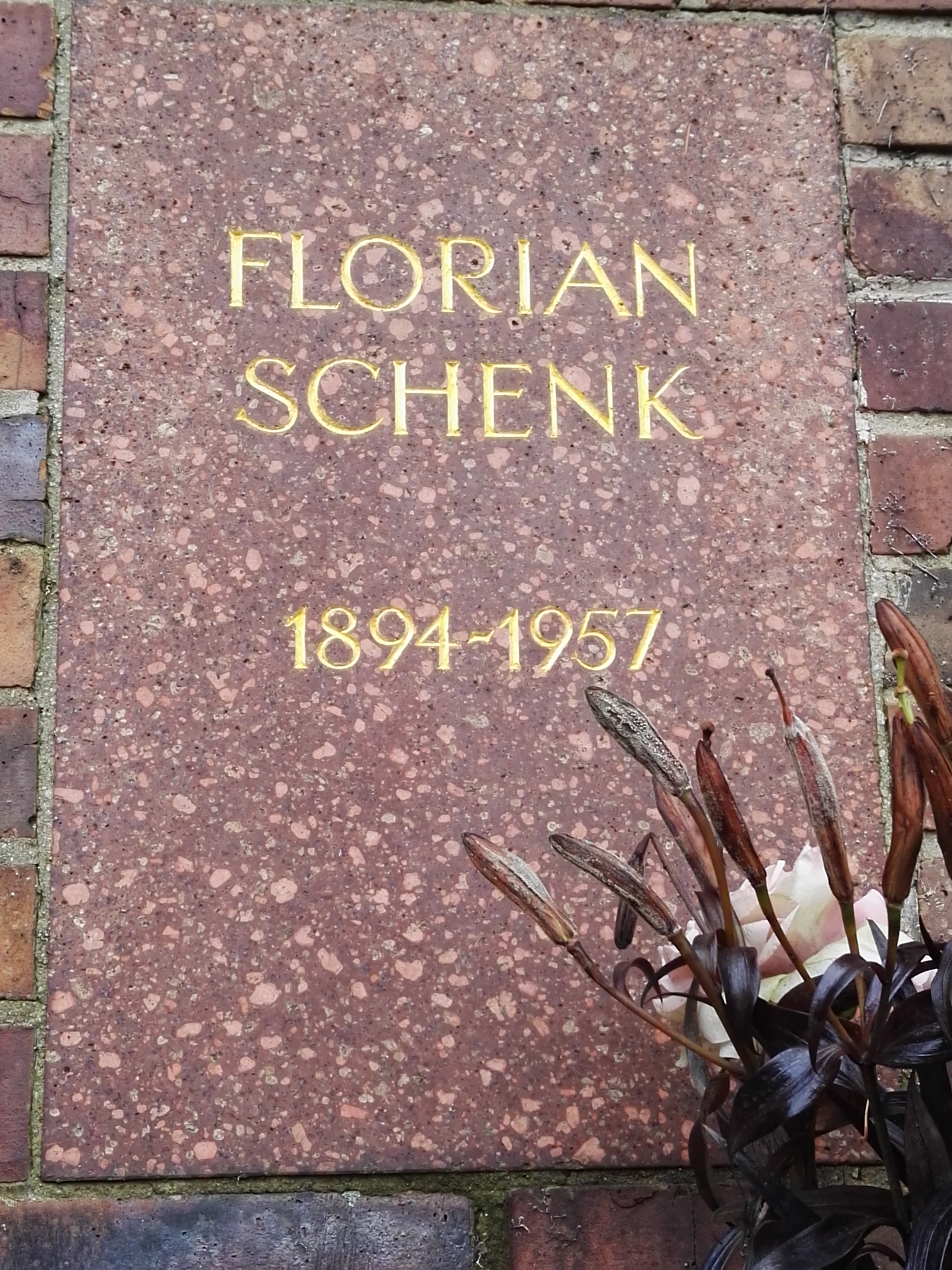 Grab von Florian Schenk in der Gedenkstätte der Sozialisten auf dem Zentralfriedhof Friedrichsfelde in Berlin-Lichtenberg